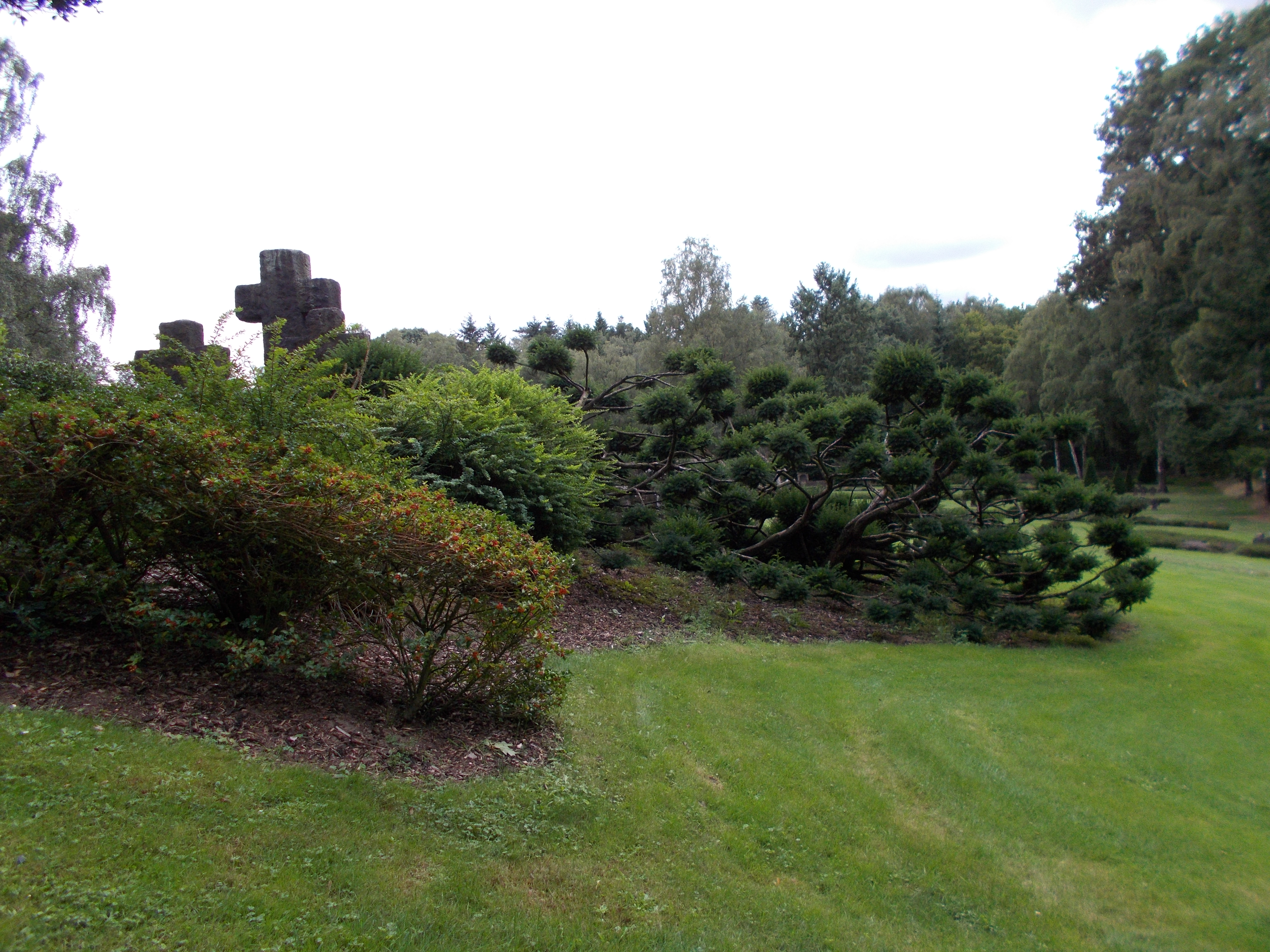 2010 wurde der Friedhof restauriert und einige Teile neu gestaltet. Das Rondell bekam dabei eine neue Bepflanzung mit Gebüschen und Formgehölzen.